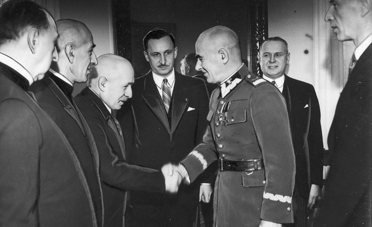 Delegacja Światowego Związku Polaków z Zagranicy na spotkaniu z marszałkiem Edwardem Śmigłym-Rydzem w Warszawie. Widoczni m.in.: prezes Światowego Związku Polaków z Zagranicy Władysław Raczkiewicz (1. z prawej), wiceprezes Światowego Związku Polaków z Zagranicy Bronisław Hełczyński (2. z prawej).